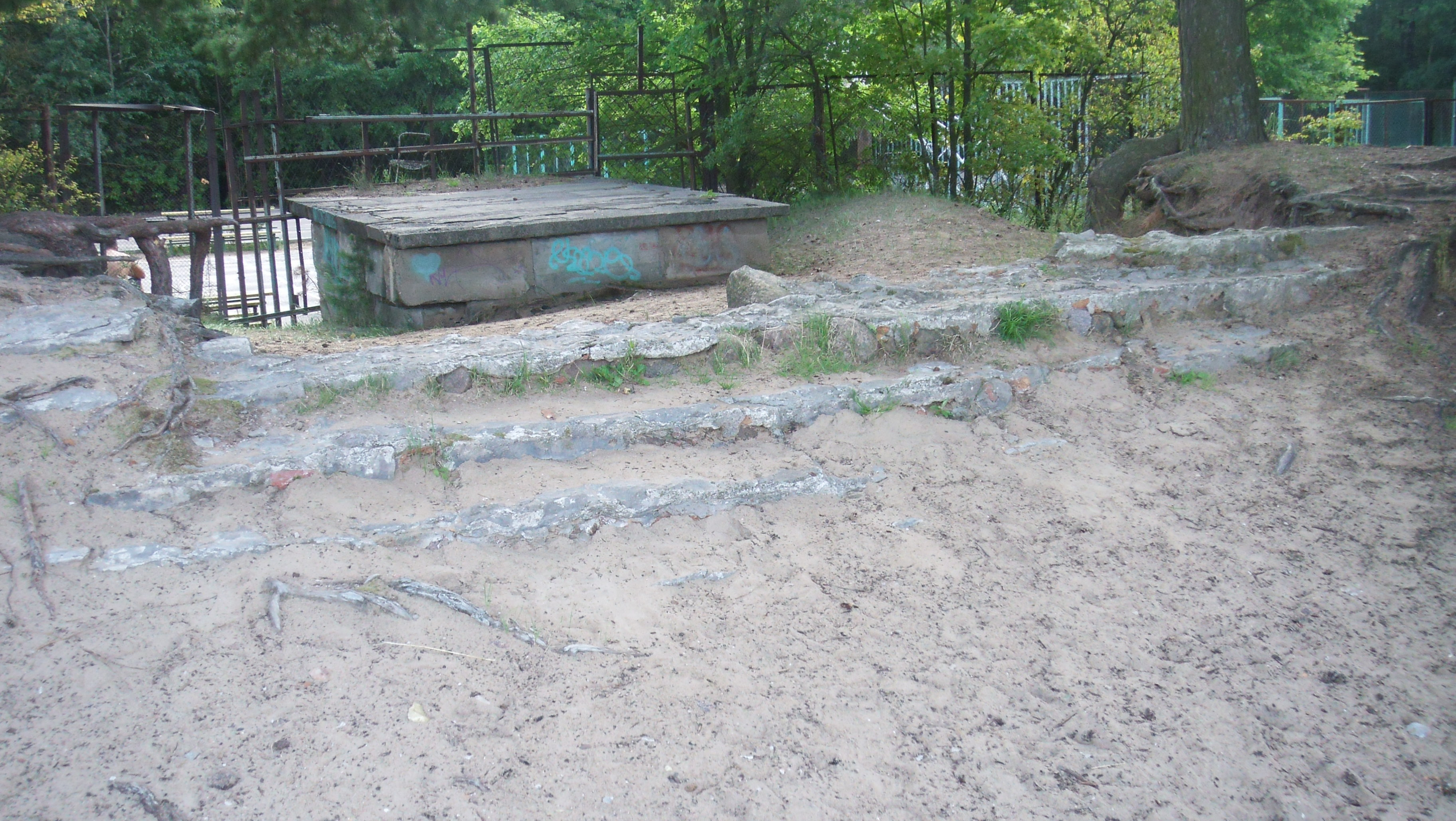 Сестрорецкий курорт место и фундамент курзала